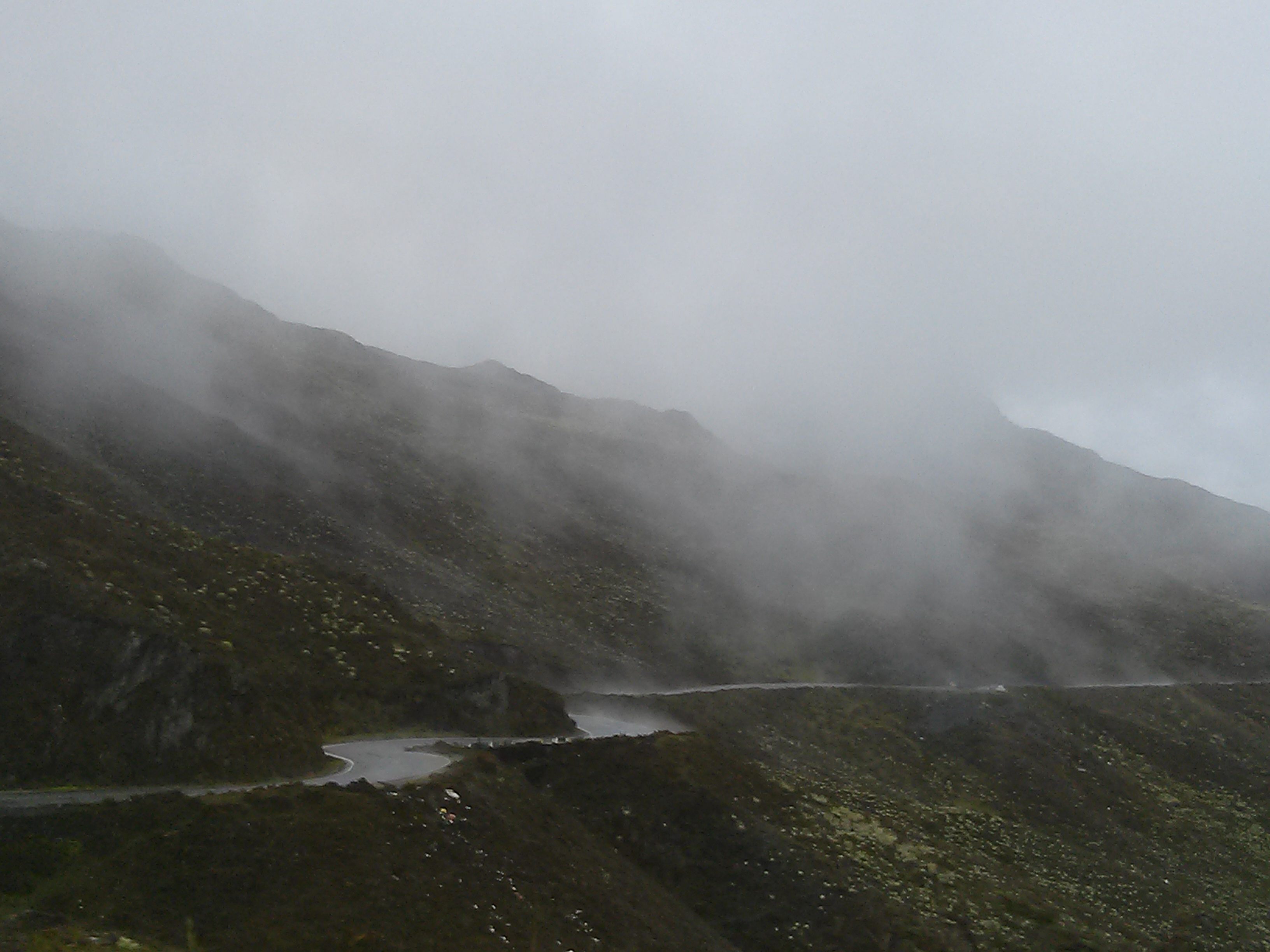 Carretera Trasandina, vía al Pico El Águila entre densa neblina y mucha lluvia.